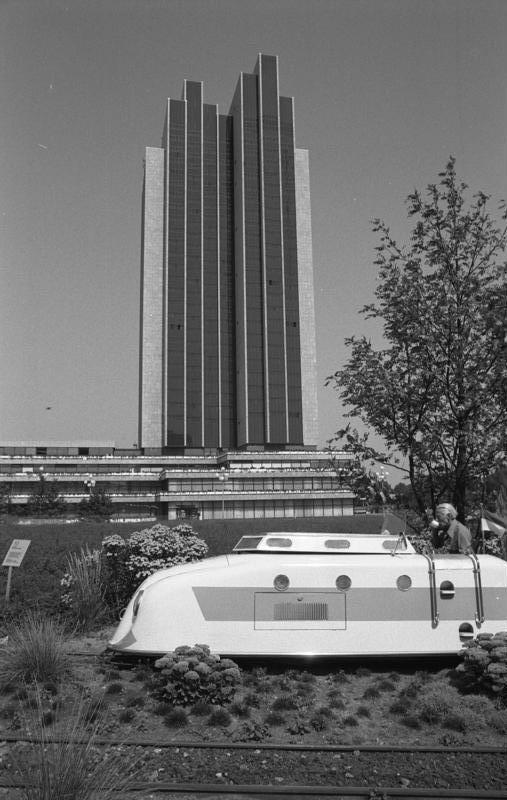 St.S. Hans Jürgen Rohr besucht die Internationale Gartenbau Ausstellung (IGA) in Hamburg